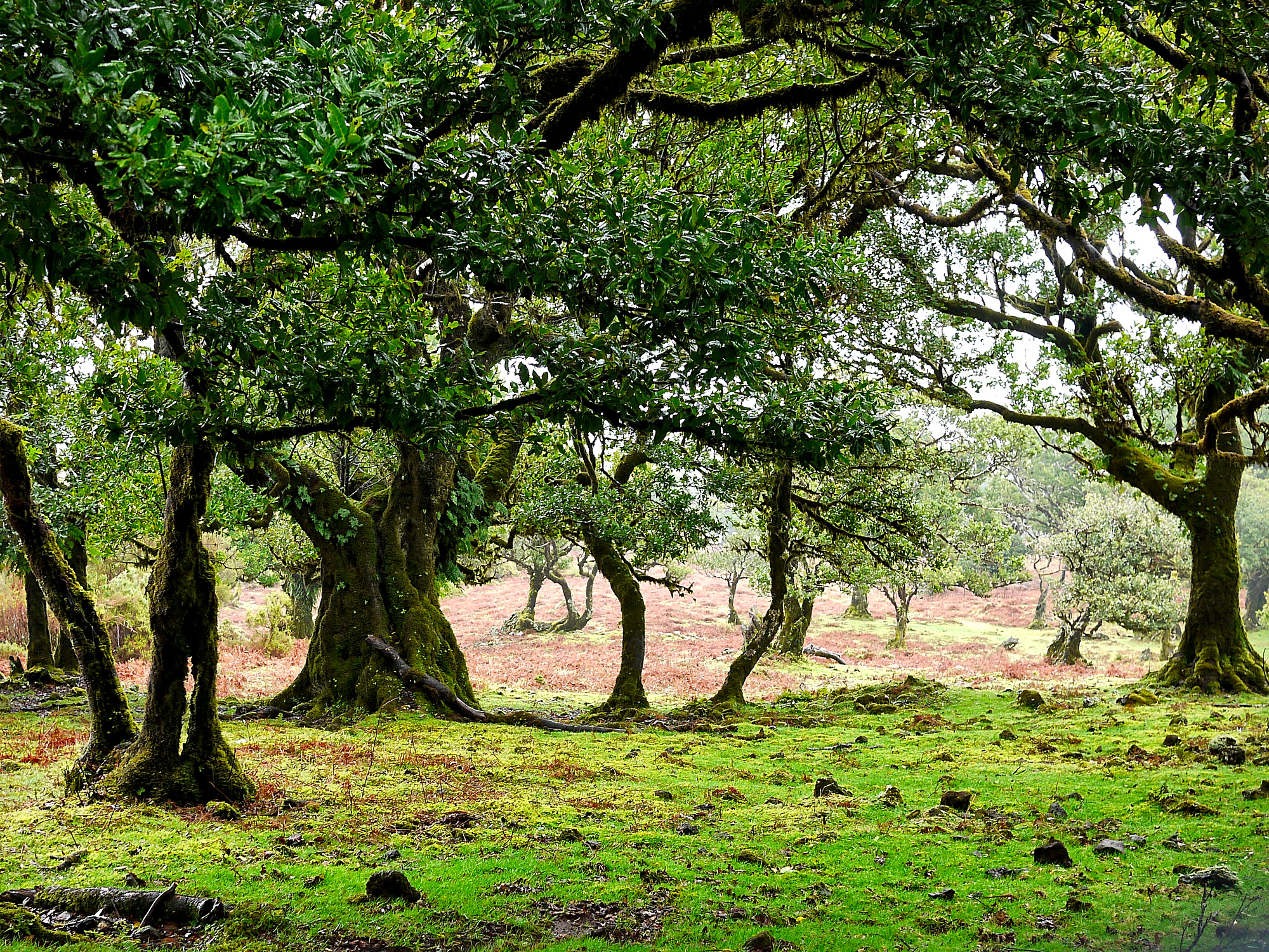 Old dull jpeg in darktable